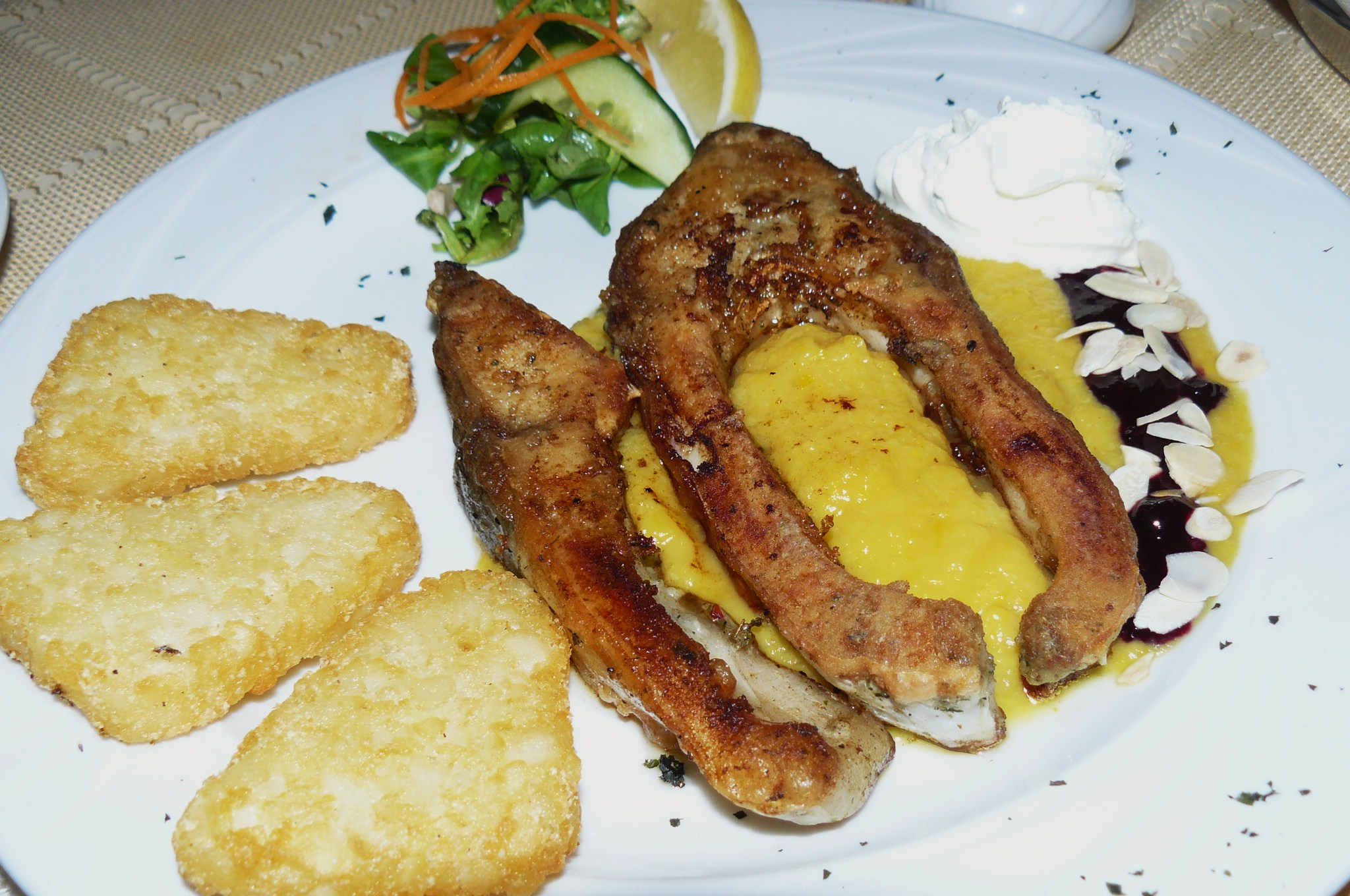 Karp milicki serwowany w Niesułowicach.